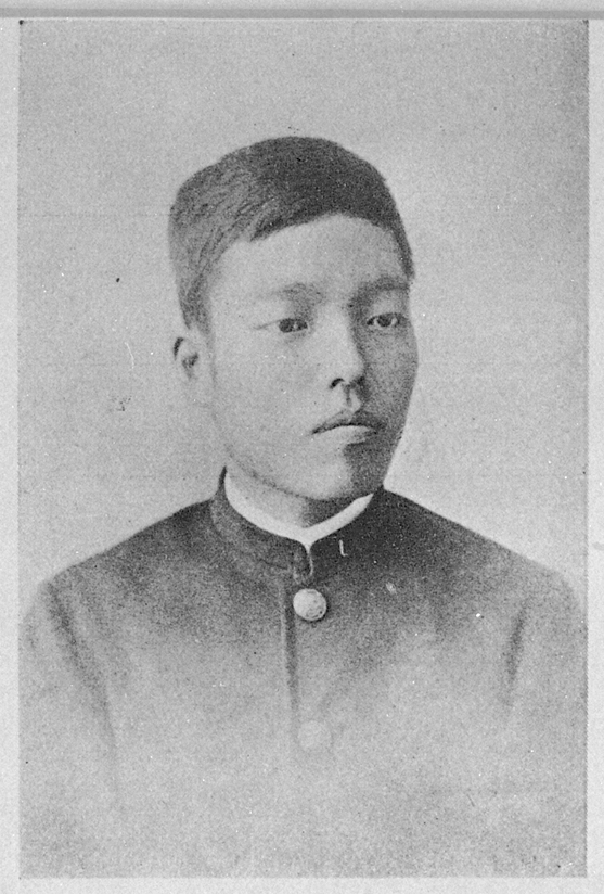 Portrait of Masaoka Shiki (正岡子規, 1867 – 1902)